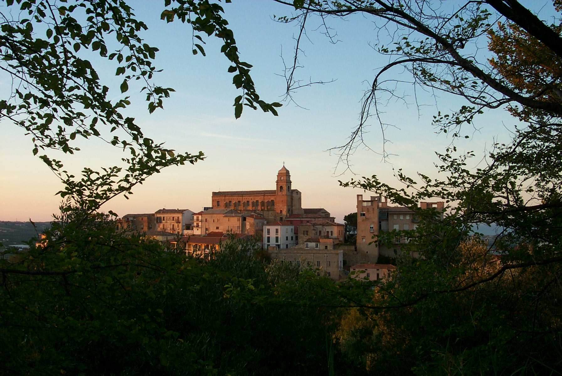 Miglianico Italy